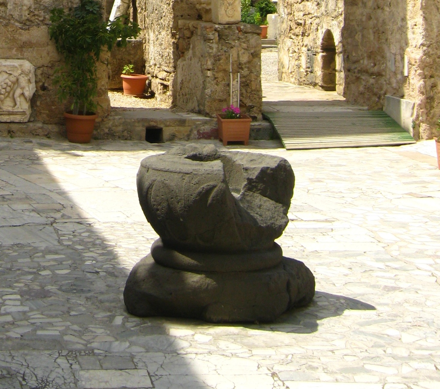 Базальтова ваза VII-VI ст. до н.е. з музею Сіде